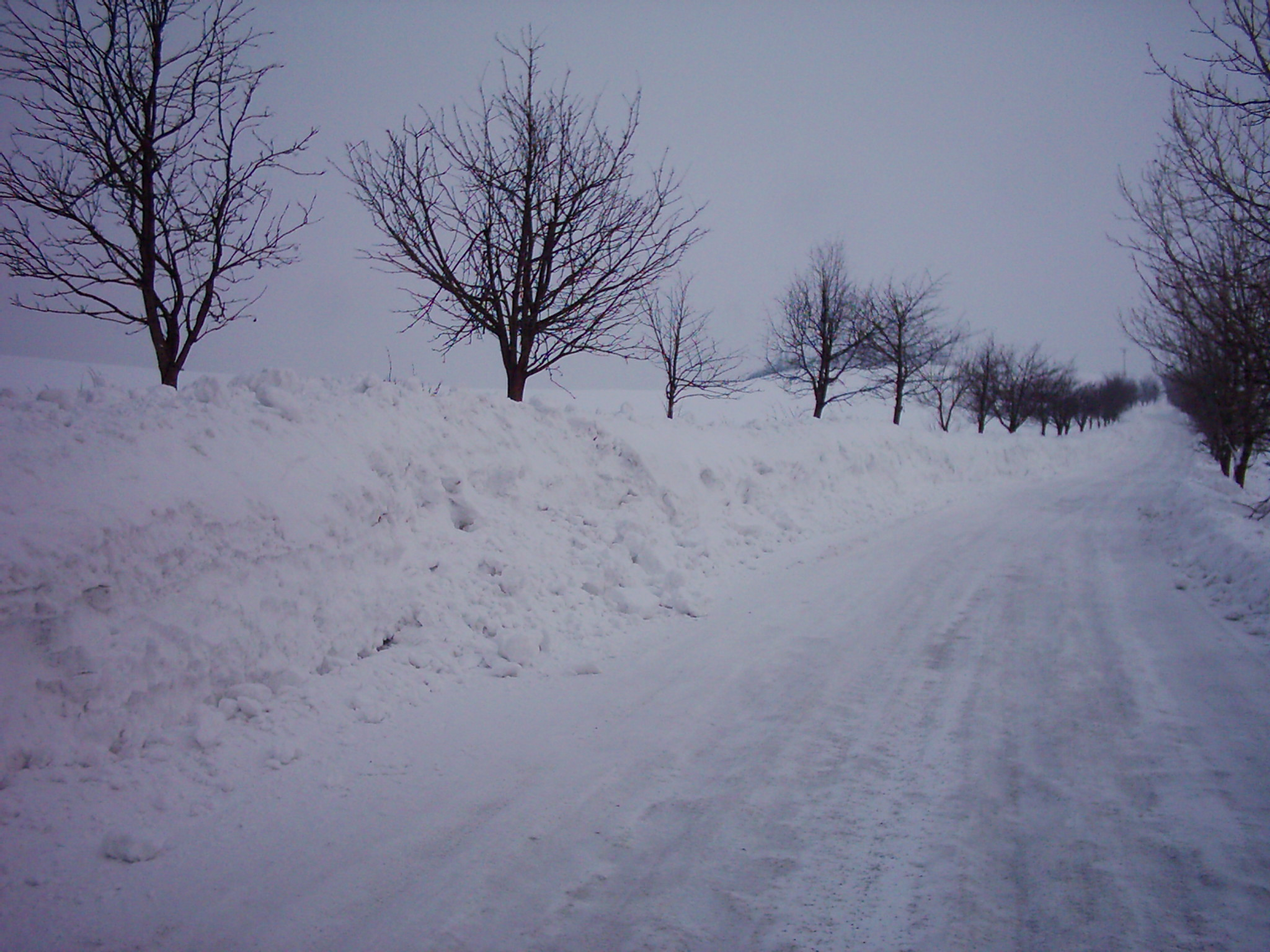 Zima 2006, silnice Příbram – Rychnov ve městě Verneřice v okrese Děčín.